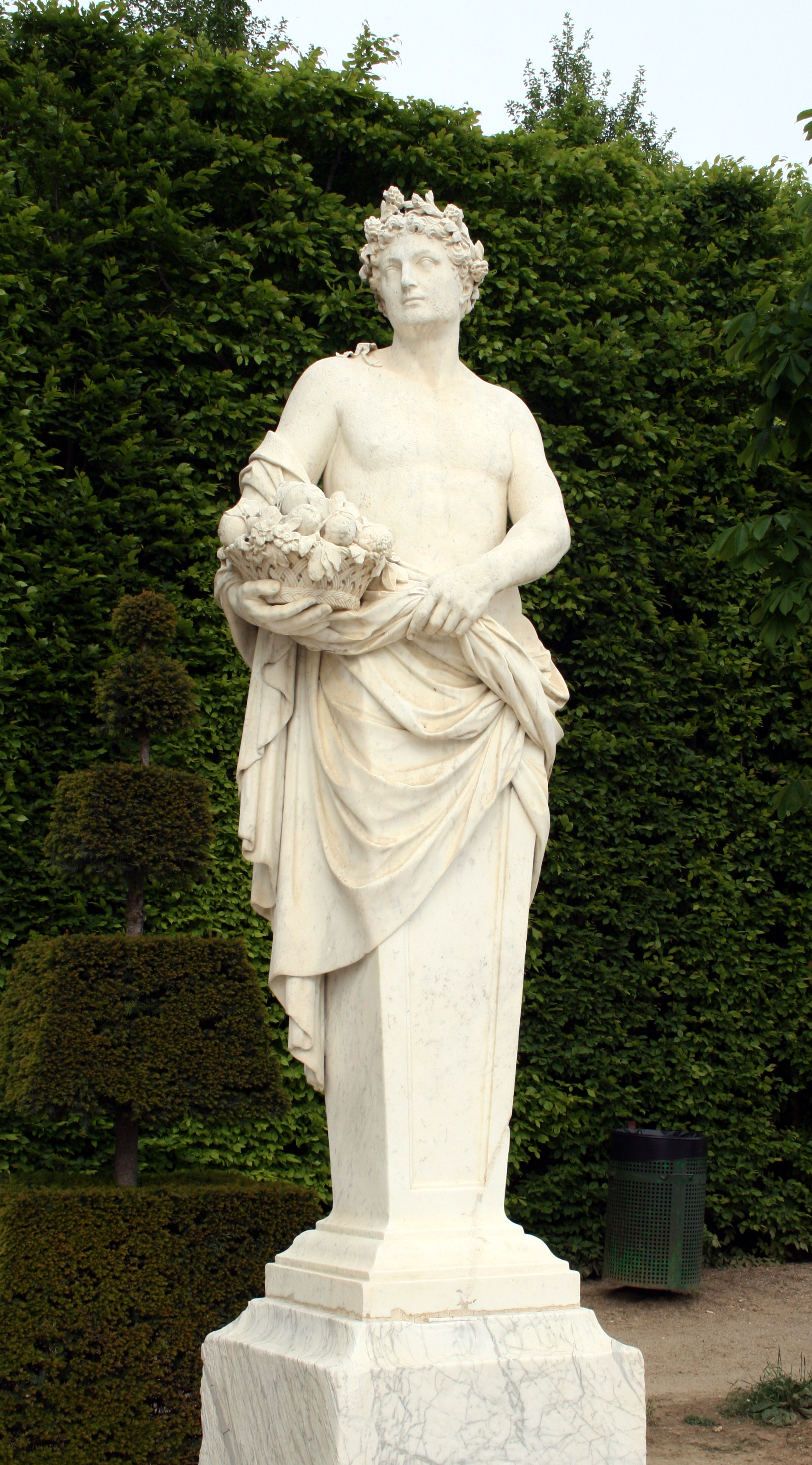 Étienne Le Hongre (Français, 1628-1690): Vertumne présentant une corbeille de fruits, Park de Versailles, demi-lune du Bassin d'Apollon.